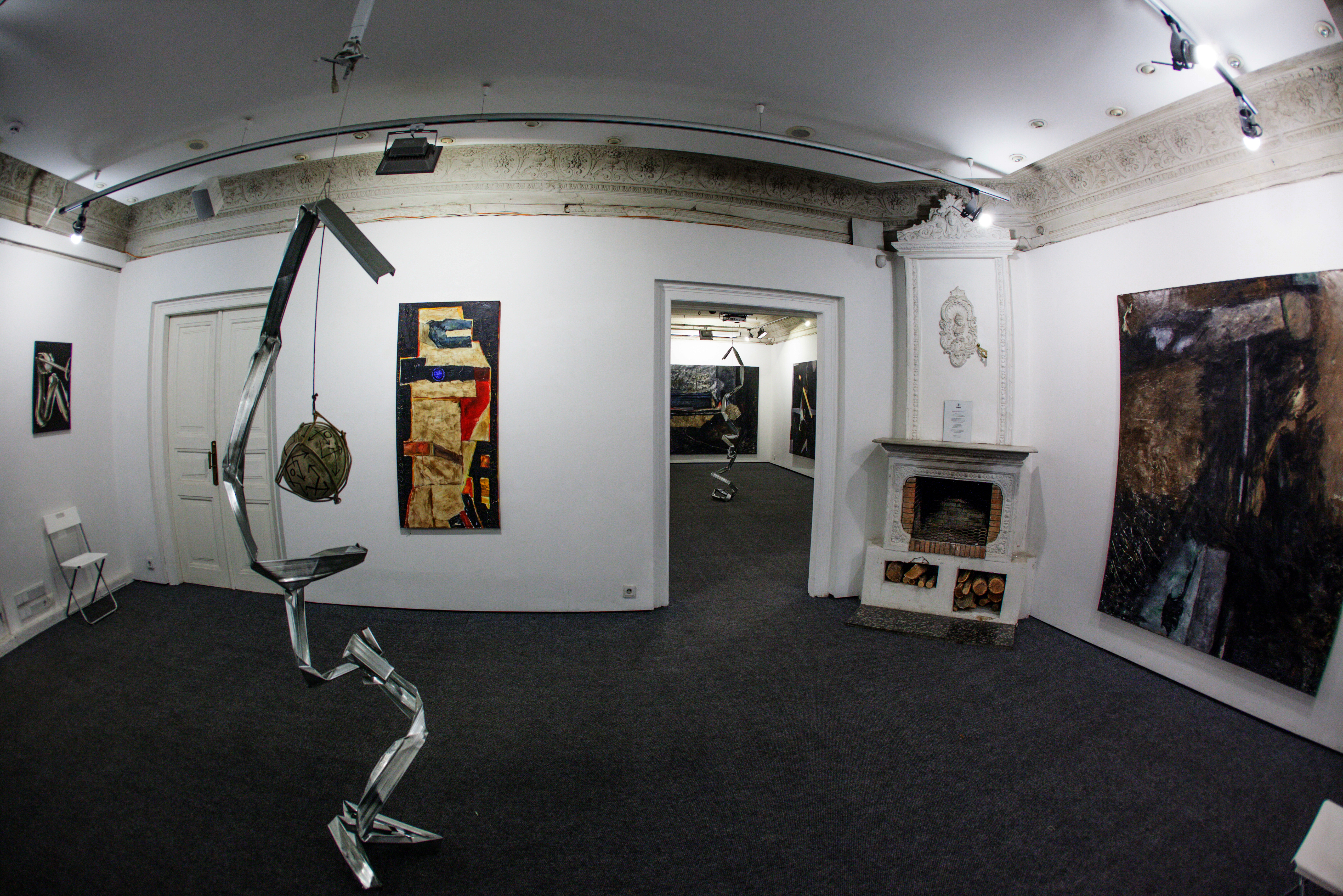 Карась Галерея експозиція проекту "2B ORNT 2B" Василь Бажай. 2017 рік.